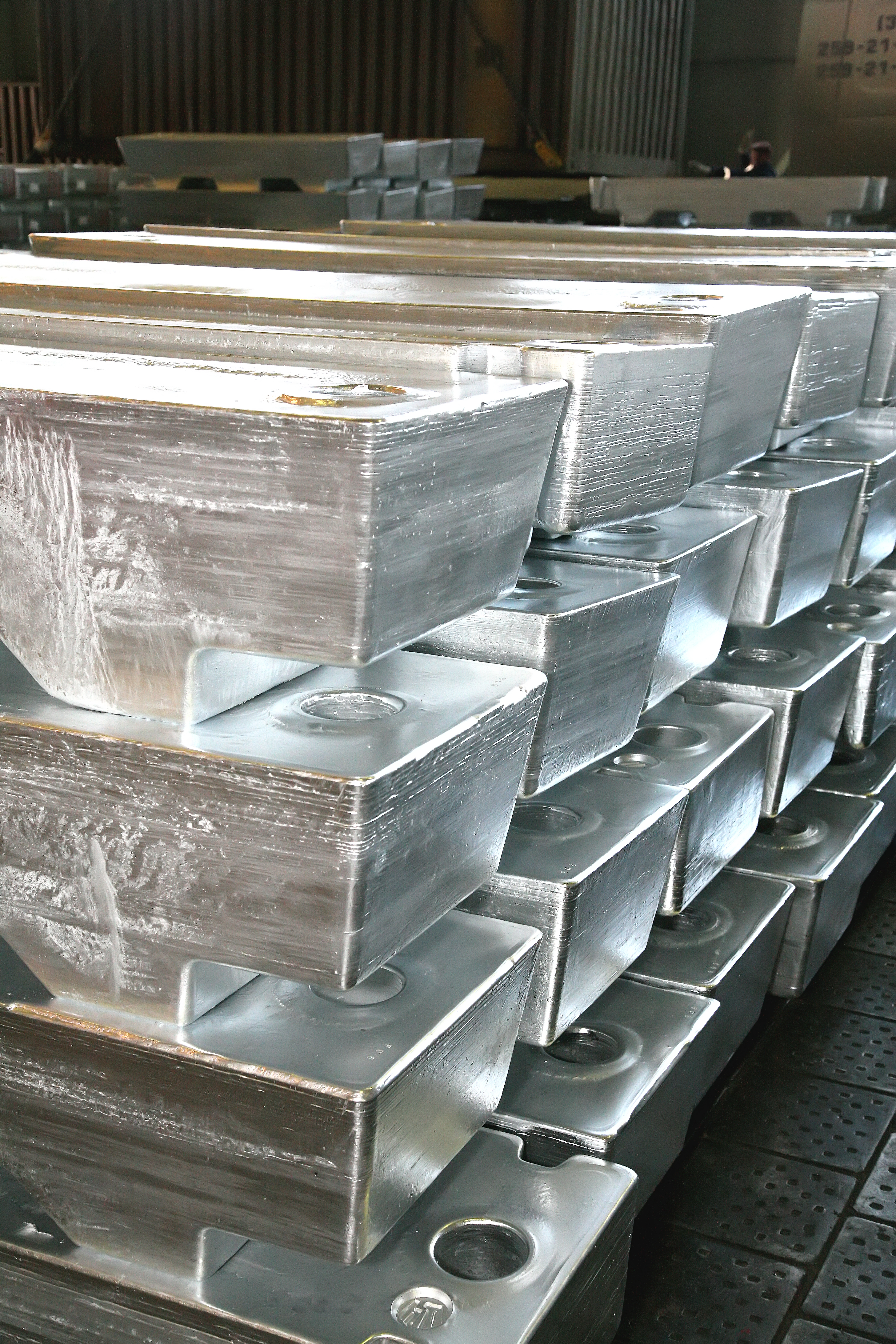 Цинк марки Special High Grade